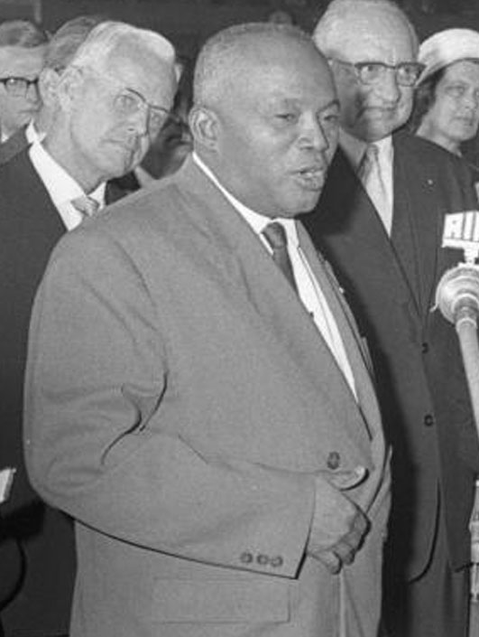 Title: Berlin, Staatsbesuch aus Madagaskar People in the image: Brandt, Willy: Bundeskanzler, Vorsitzender der SPD, Regierender Bürgermeister Berlin-West, Bundesrepublik Deutschland (GND 11851444X) * Tsiranana, Philibert: Präsident, Madagaskar (GND 118763083) Factual corrections and alternative descriptions are encouraged separately from the original description. Additionally errors can be reported at this page to inform the Bundesarchiv. Original historic description: Staatsbesuch Madagaskar: Ankunft Berlin-Tempelhof Begrüßung durch Bgm. Brandt